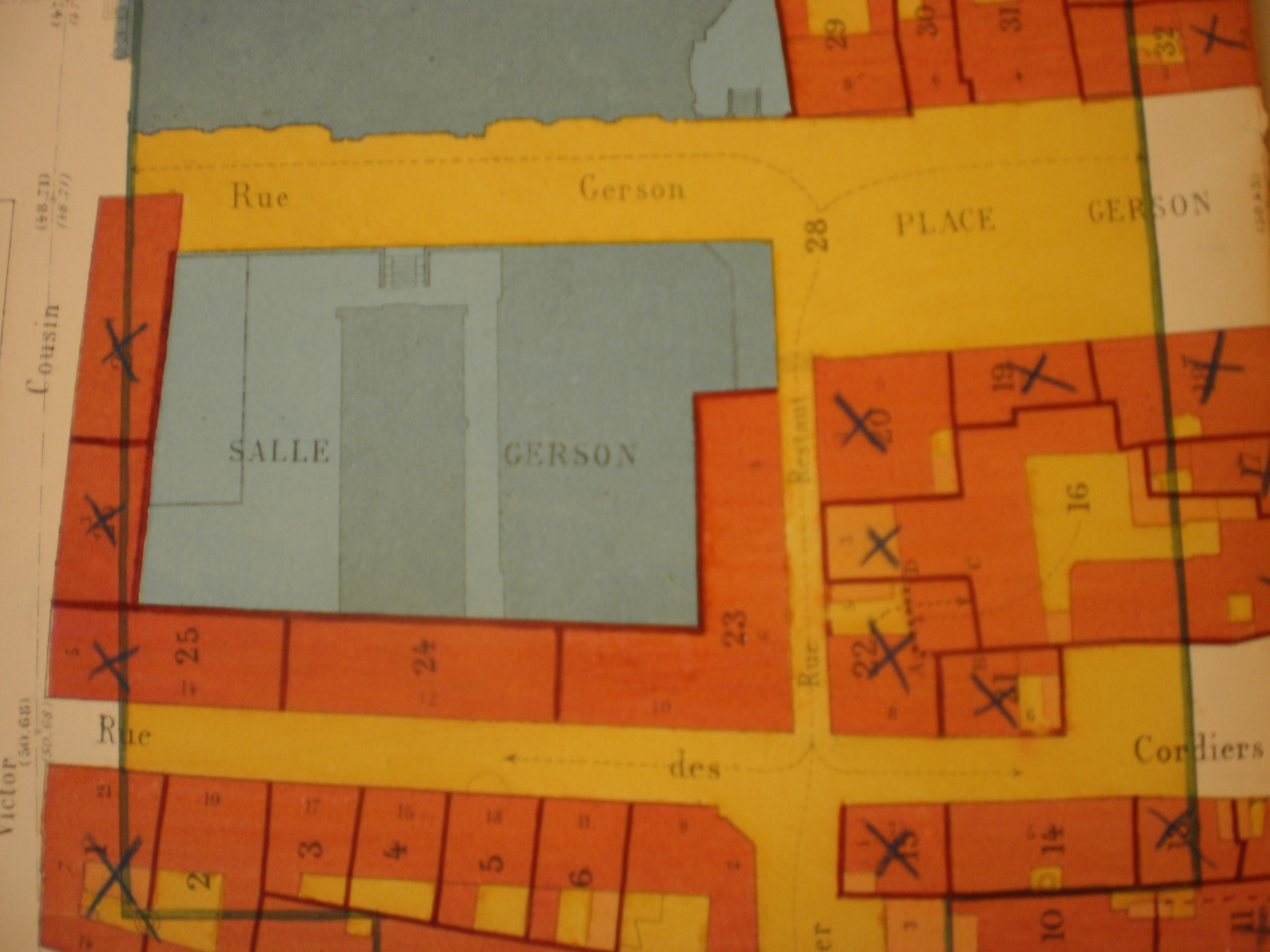 La Salle Gerson se trouvait entre la Rue Victor Cousin et la Rue Toullier. Elle était le 1er siège de la Société Française de Physique qui tint sa première réunion le 17 janvier 1873. Mr d'Almeida avait obtenu l'autorisation de cette Salle par le Vice-Recteur de l'Académie de Paris pour y tenir des réunions et y réaliser des expériences de Sciences Physique.Plans de la Sorbonne aux Archives de Paris Cote VM62 4.